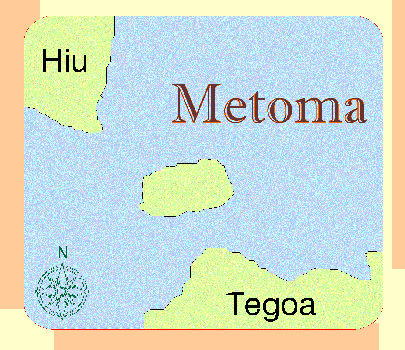 Карта на остров Метома.